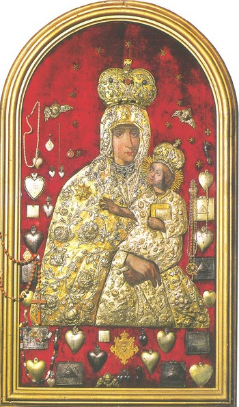 Богоматерь Снежная. XVII-XVIII вв. Дер. Индура Гродненского р-на